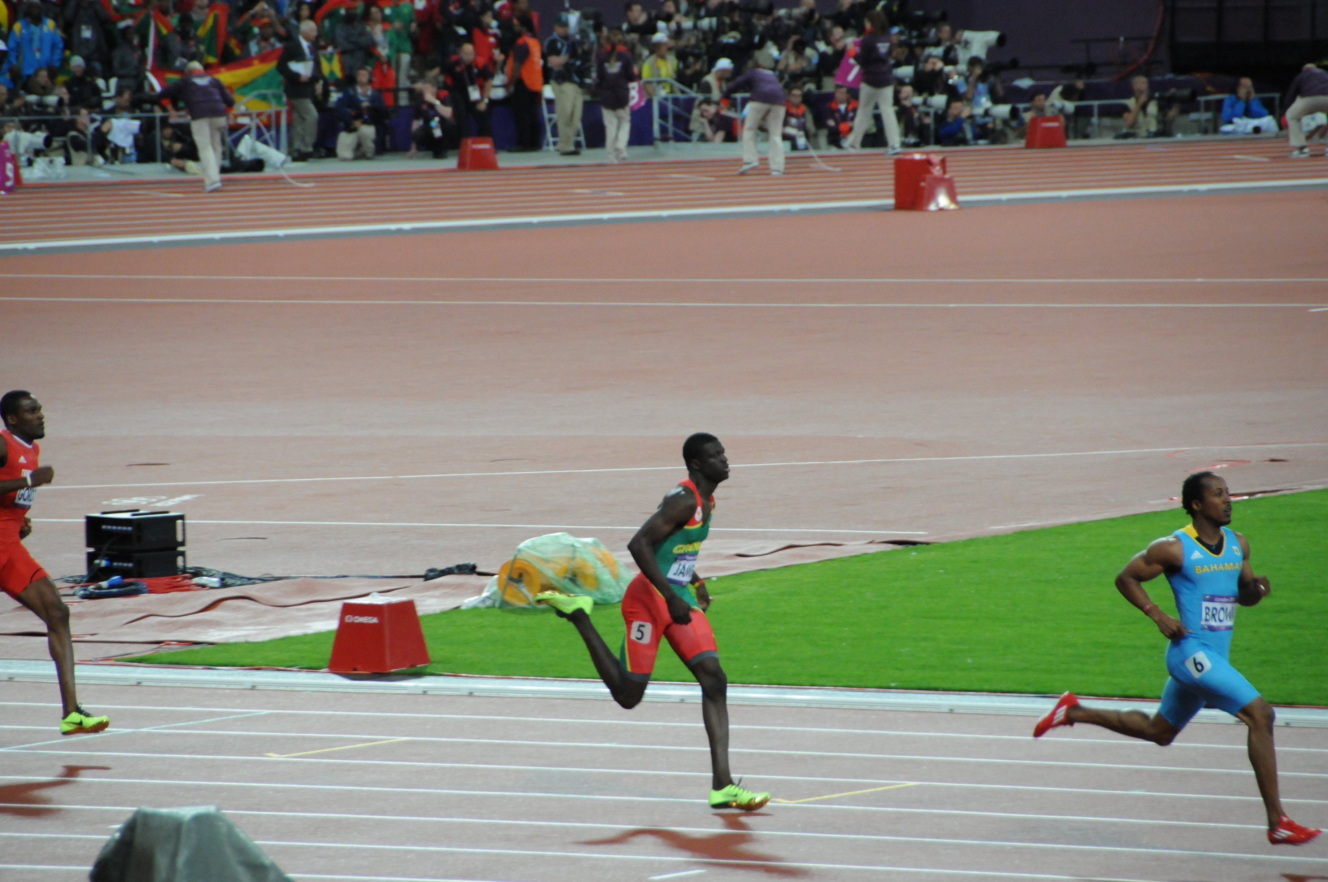 Au milieu Kirani James de Grenade: champion olympique du 400m. Kirani James, Chris Brown